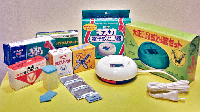 電子蚊取り器と専用のピース、マット